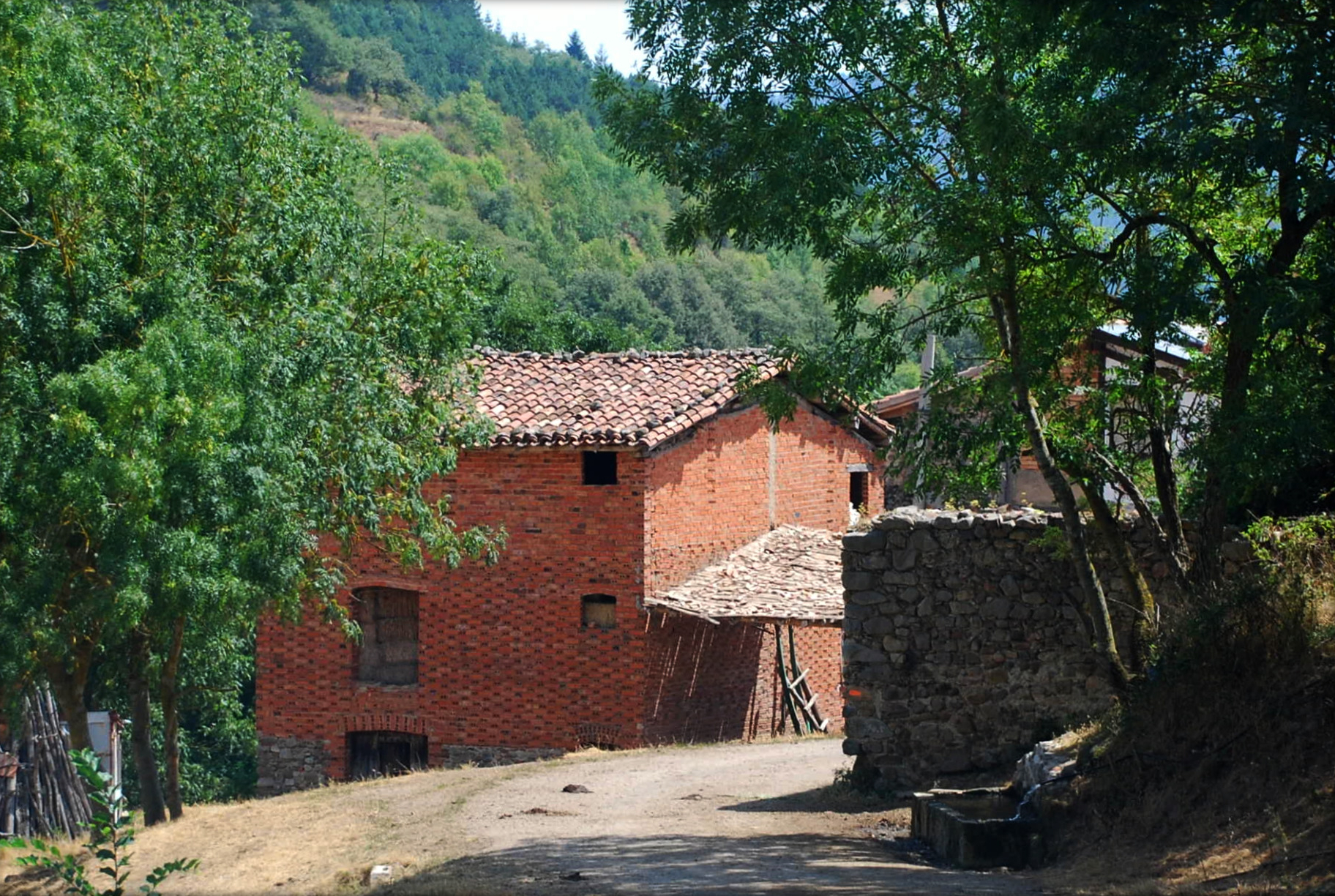 Arviza, aldea de Ojacastro en La Rioja (España).